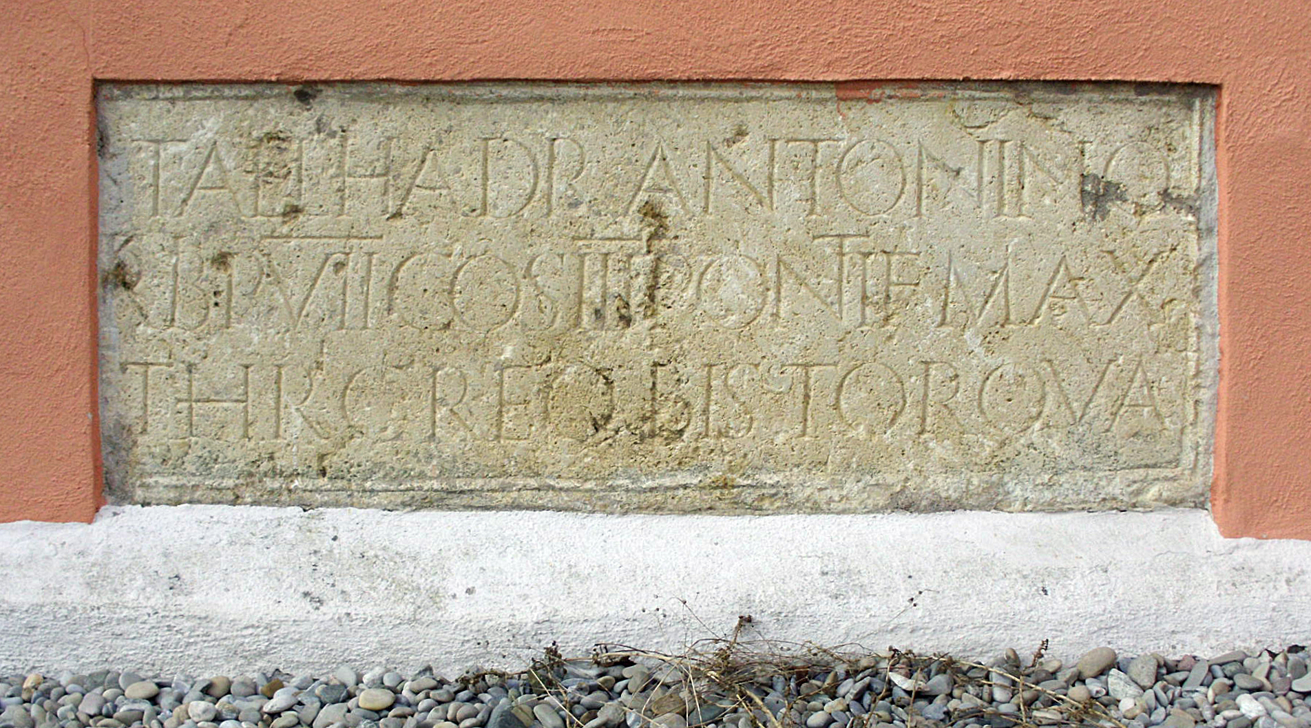 Gnotzheim im mittelfränkischen Landkreis Weißenburg-Gunzenhausen, Pfarrkirche St. Michael, römischer Inschriftenstein (144 n. Chr.)